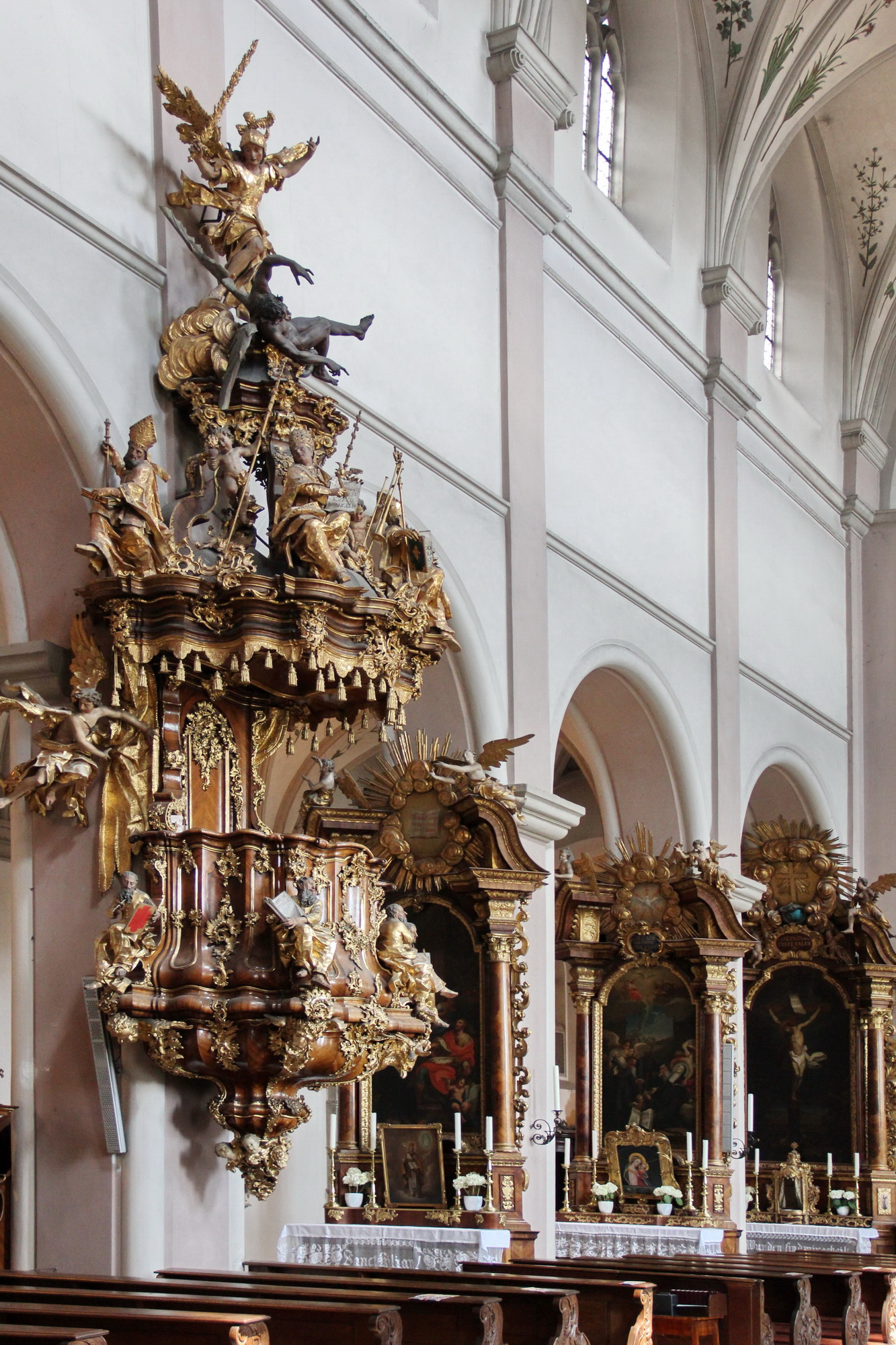 Michaelsberg Abbey Native nameKloster MichelsbergLocationBamberg, eee, GermanyCoordinates49° 53′ 37″ N, 10° 52′ 38″ E